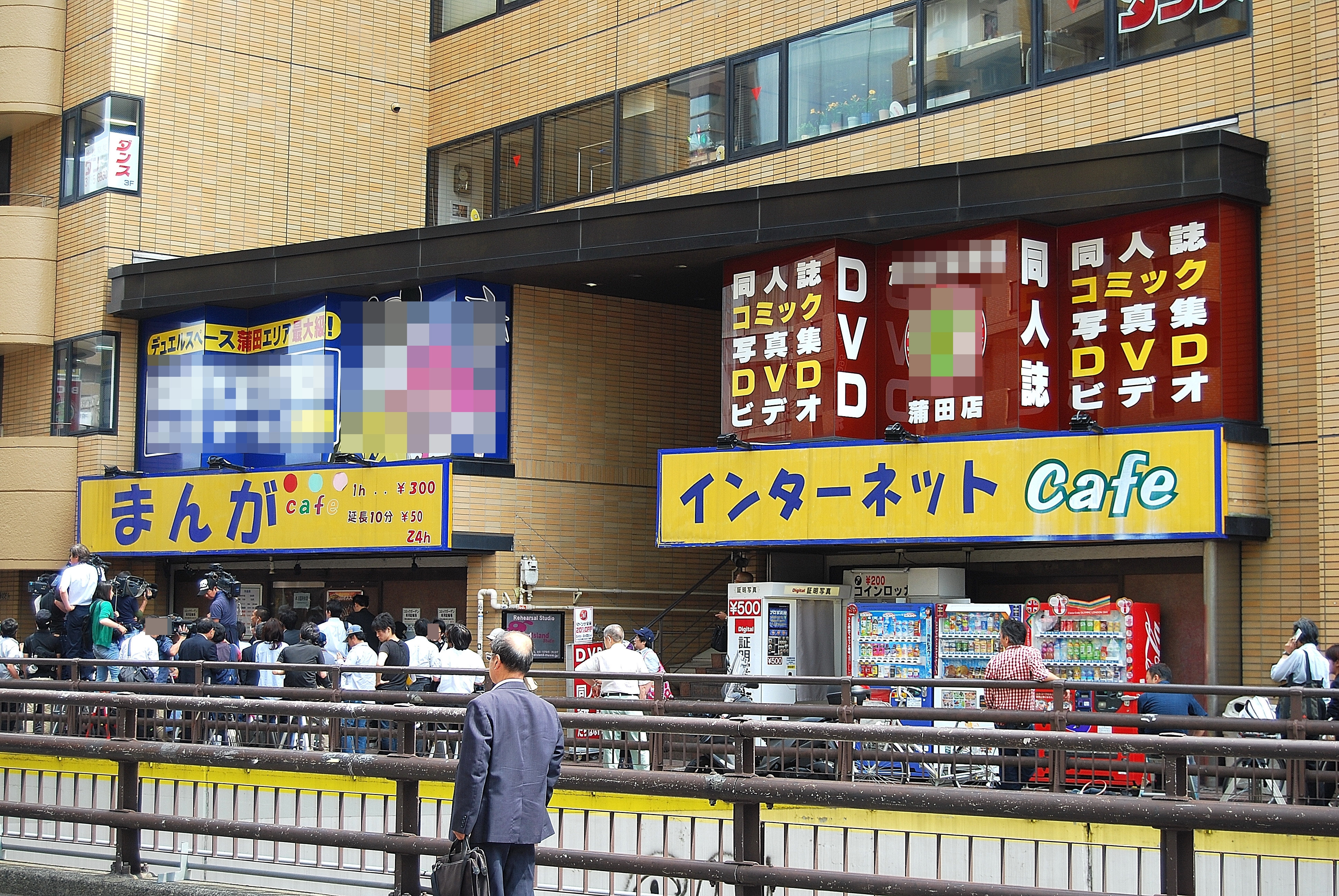 逮捕された高橋克也が利用していた漫画喫茶（左側）、右側にインターネットカフェがある。